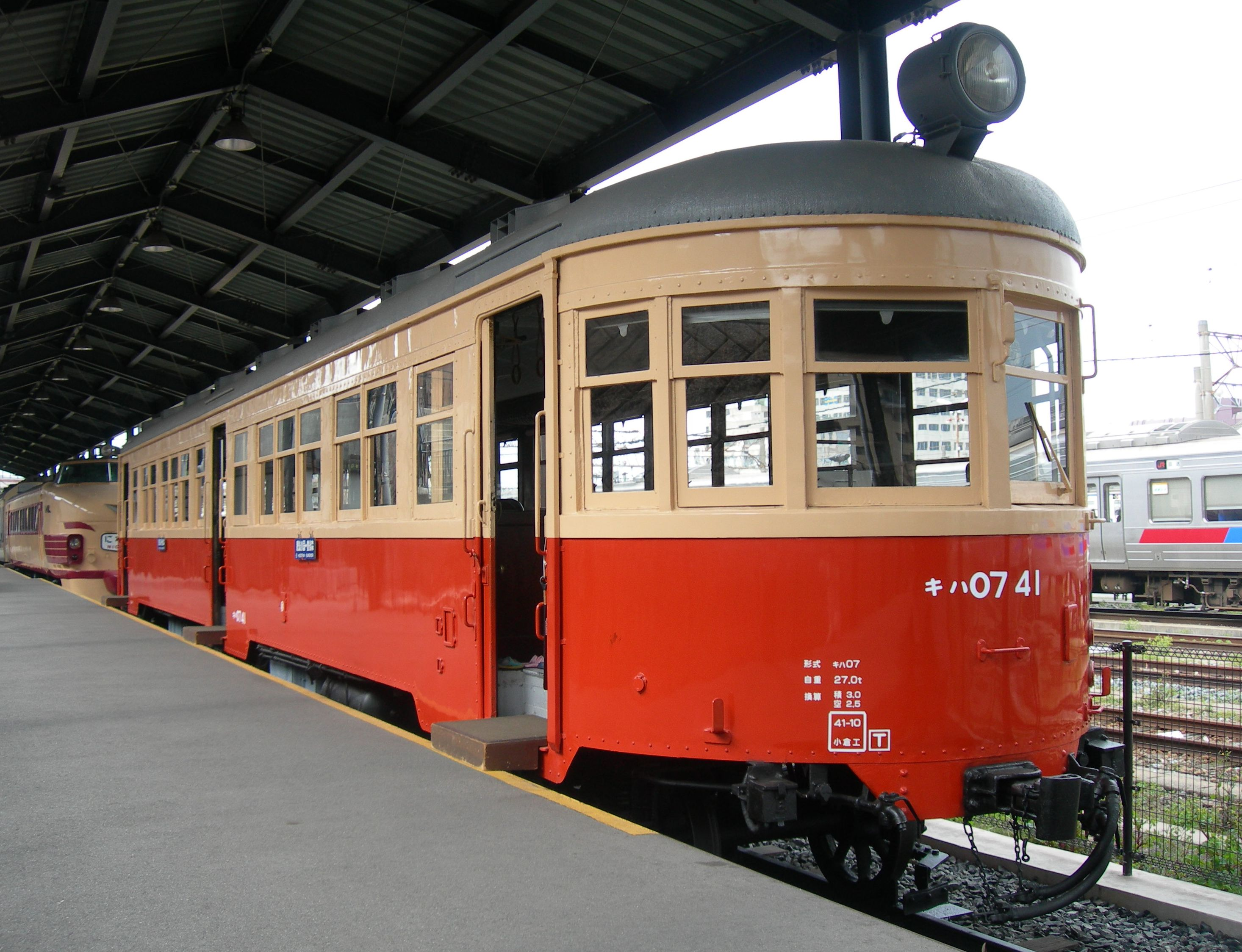 国鉄キハ07形気動車 キハ07-41 外観